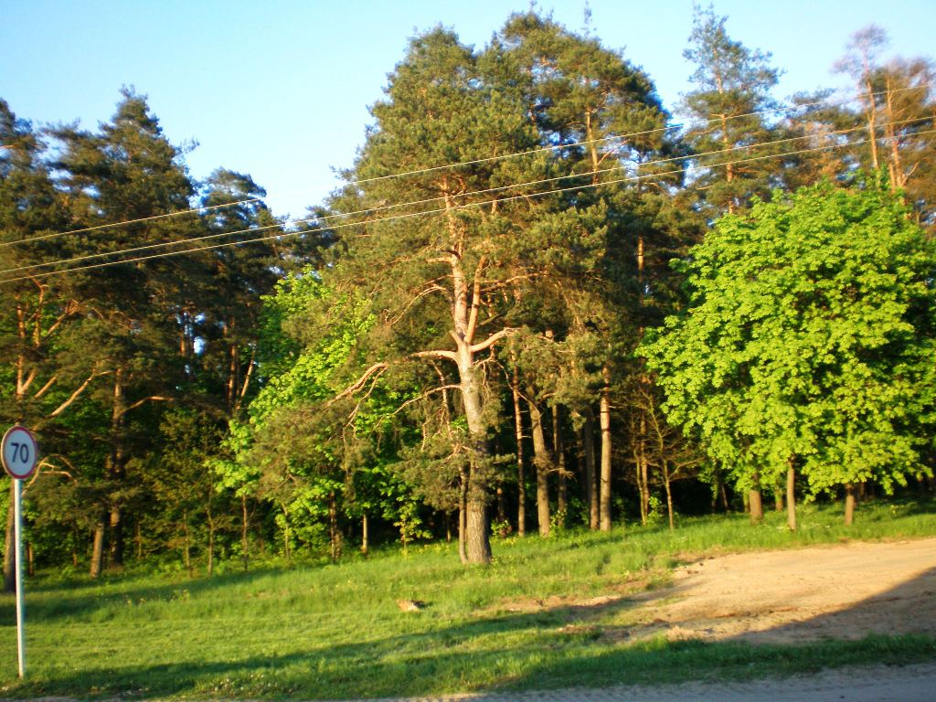 Babėnų miškas 2007.05.19 Foto: Hugo.arg